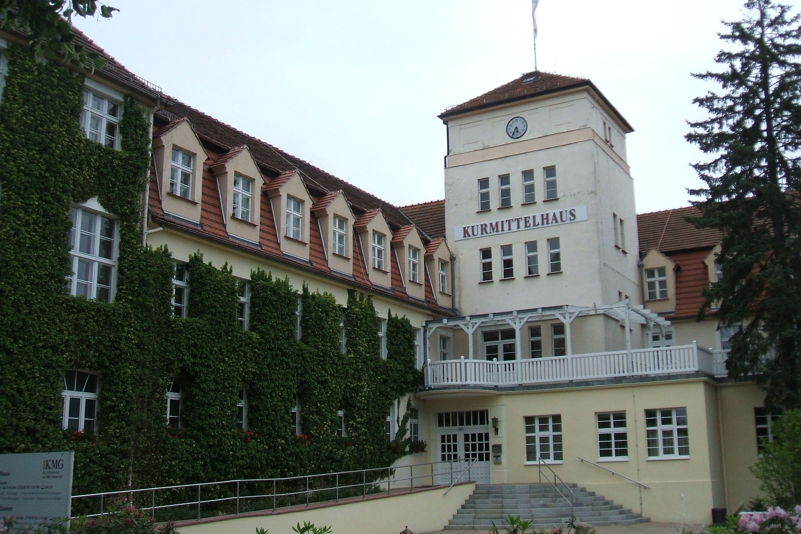 Bad Wilsnack, Brandenburg, Deutschland, Kurmittelhaus